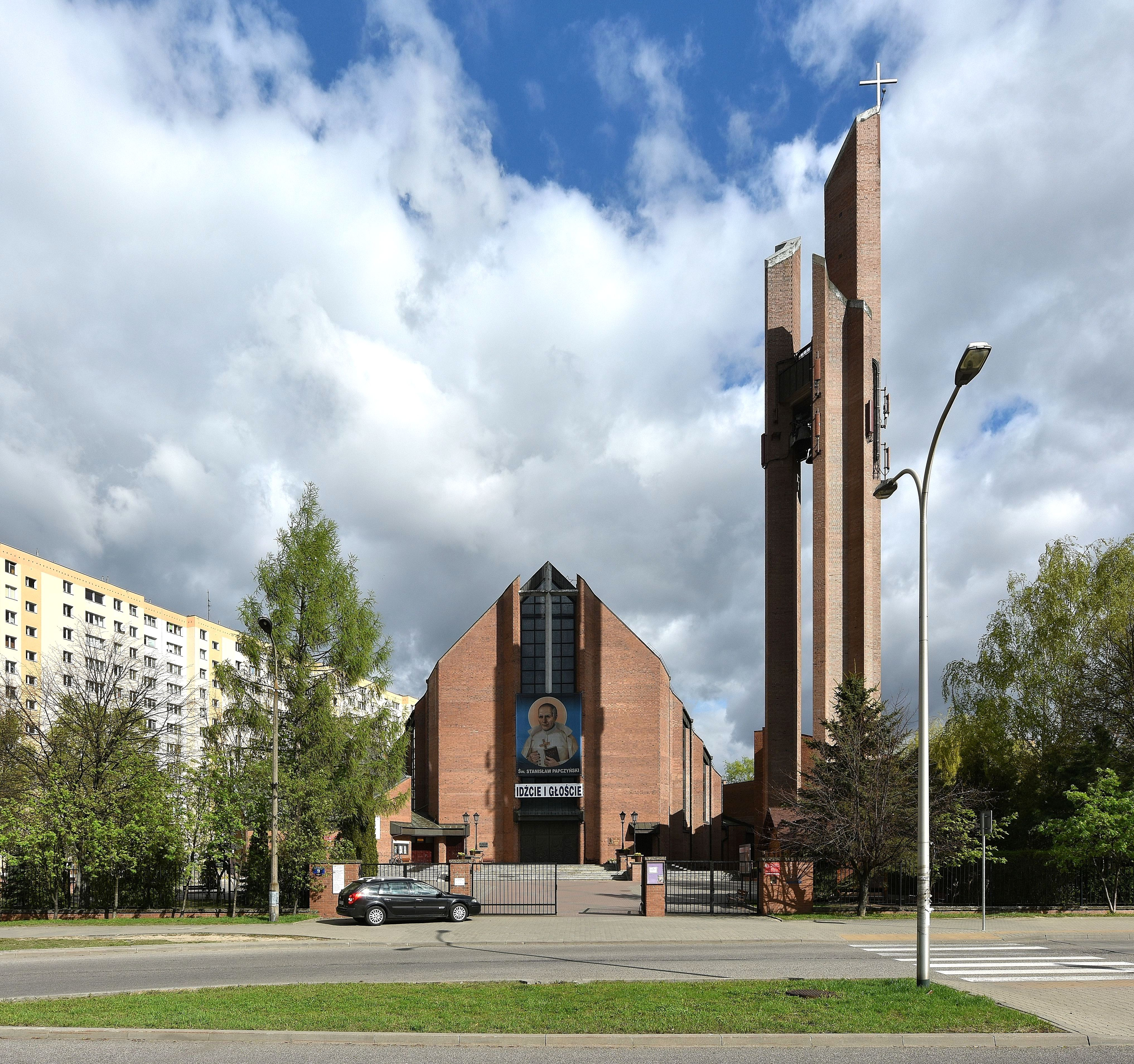 Kościół NMP Matki Miłosierdzia przy ul. św. Bonifacego na Stegnach w Warszawie